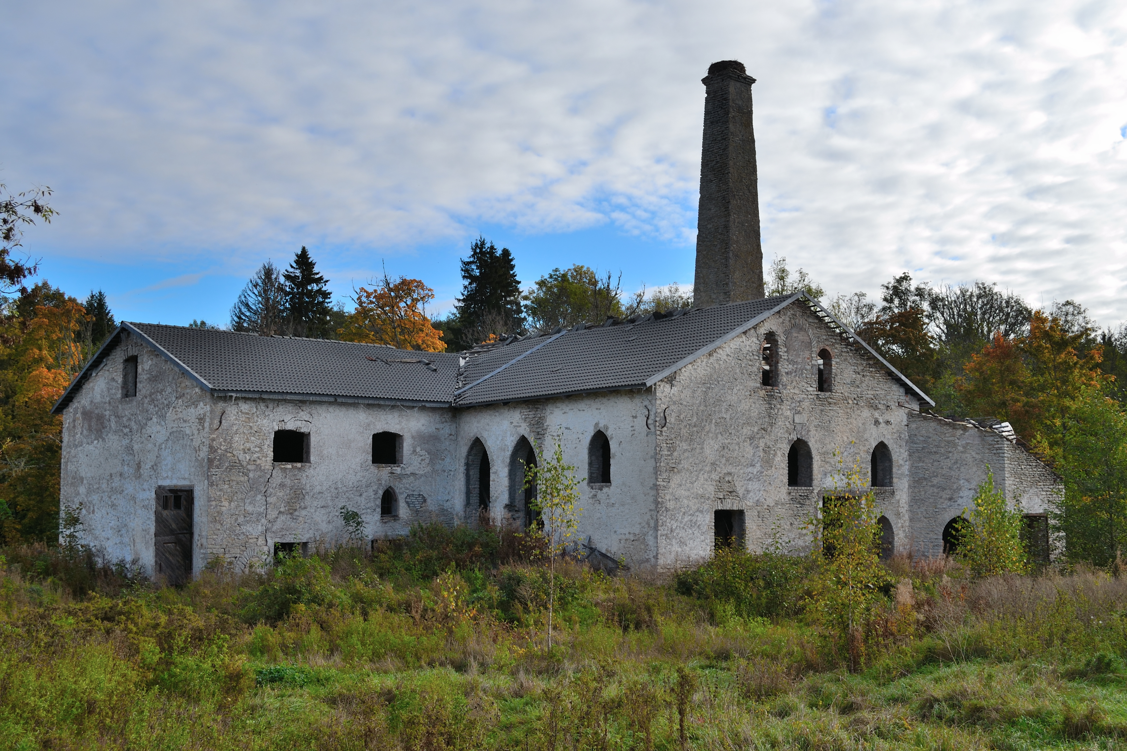 Lohu mõisa viinavabrik